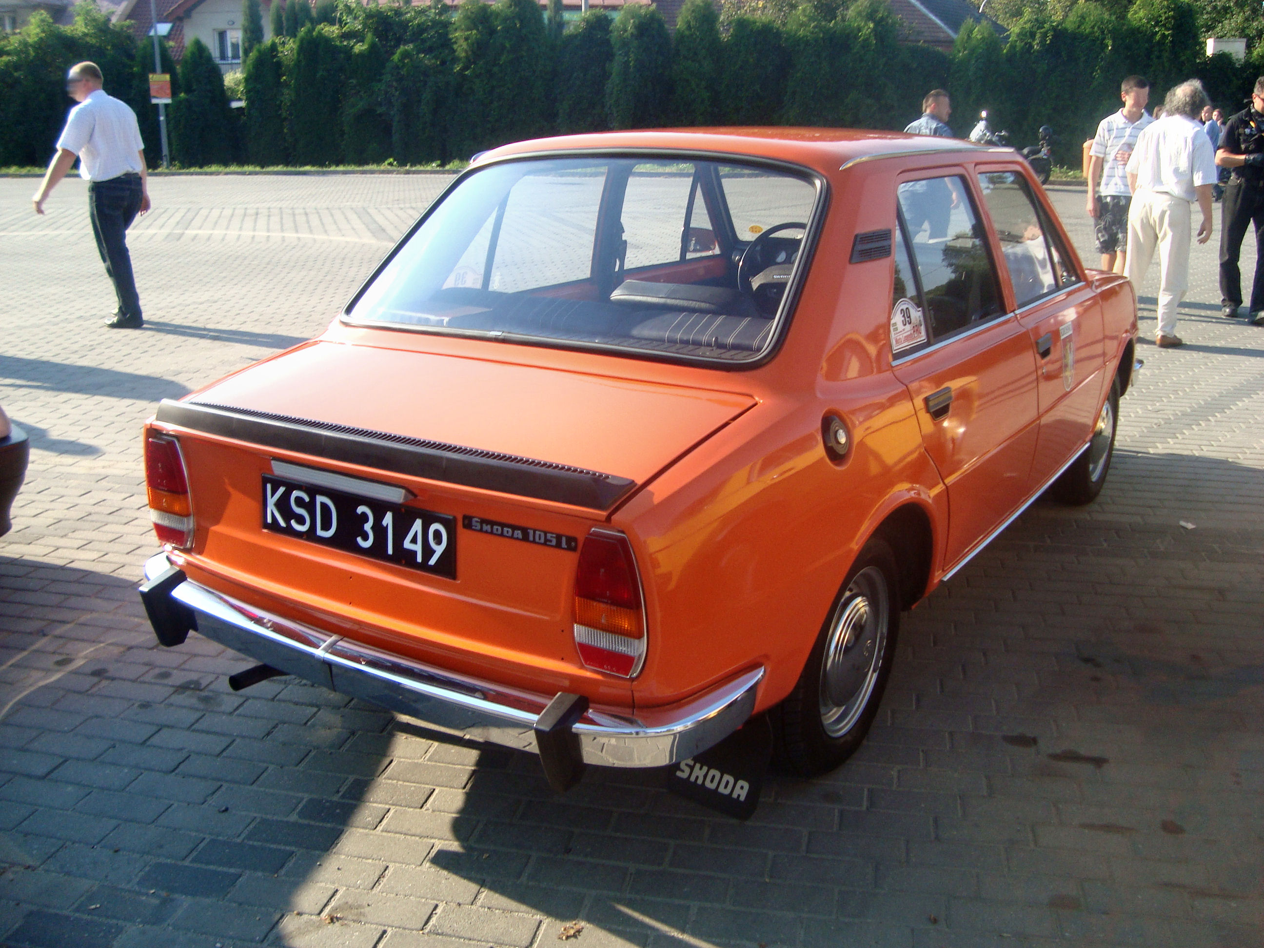 Skoda 105L z 1982 roku Jaśle